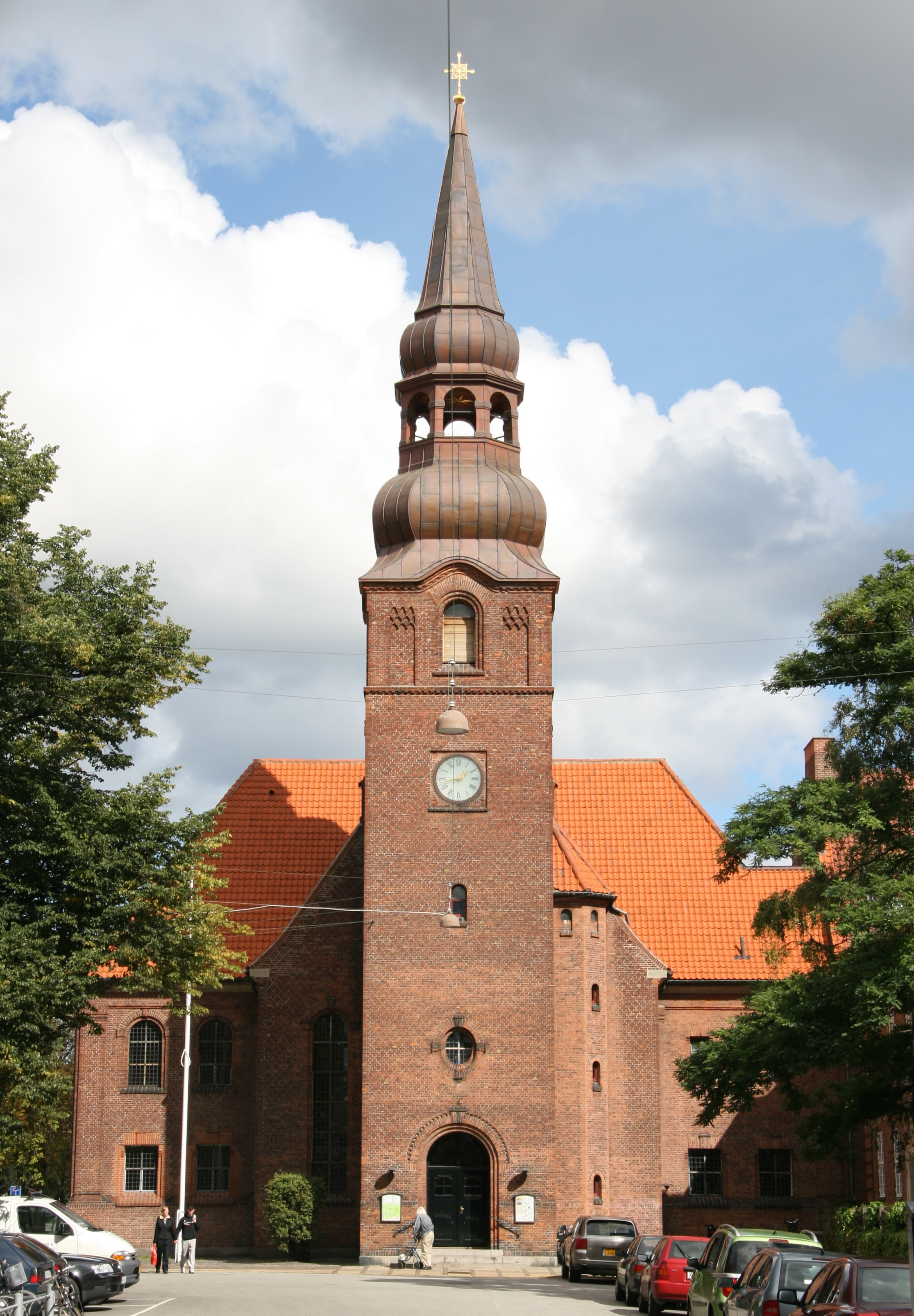 Simeons Kirke, Copenhagen, Denmark. Simeons Kirke